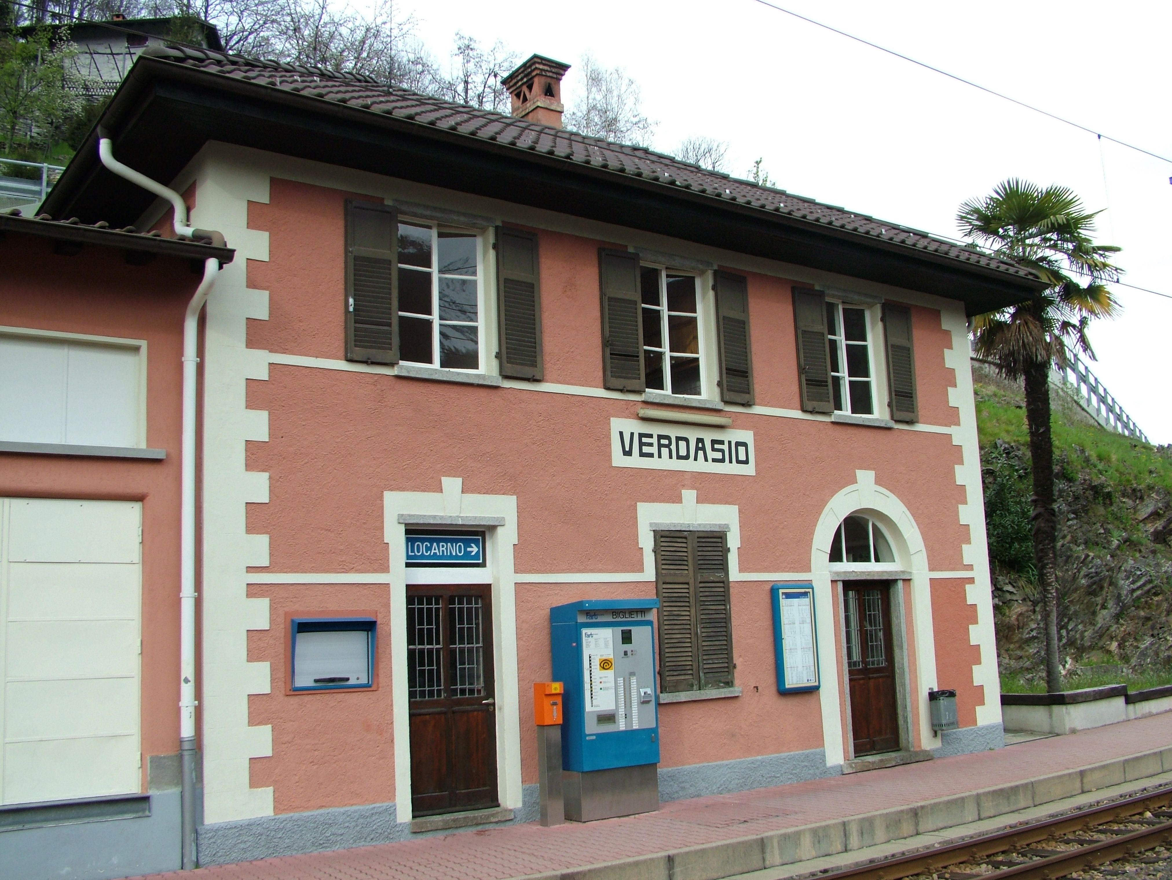 Verdasio, Tessin, Schweiz, ein Ortsteil von Intragna, der Bahnhof an der Centrovalli-Bahn